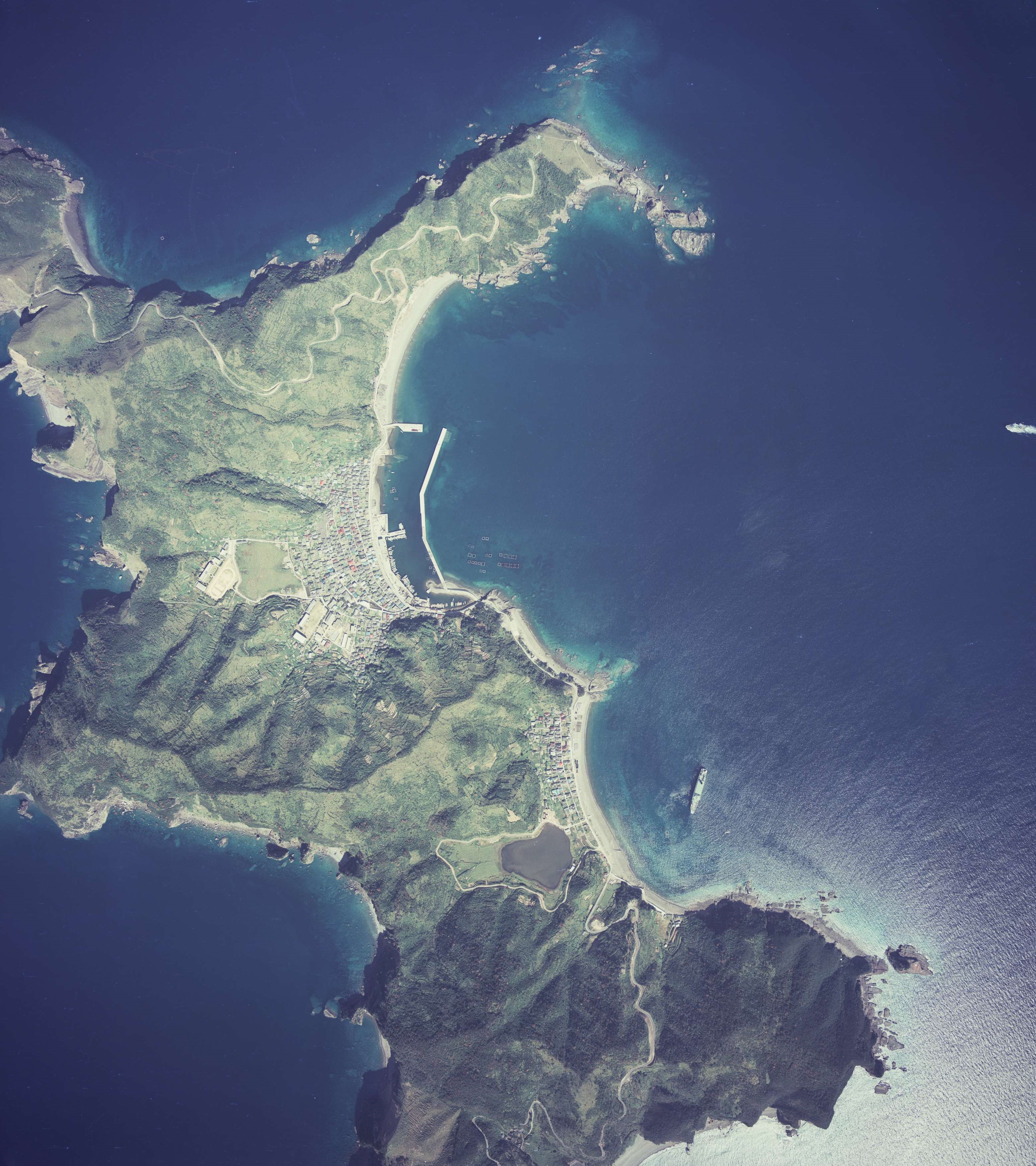 鹿児島県薩摩川内市鹿島町藺牟田の藺牟田集落付近上空を撮影した航空写真。